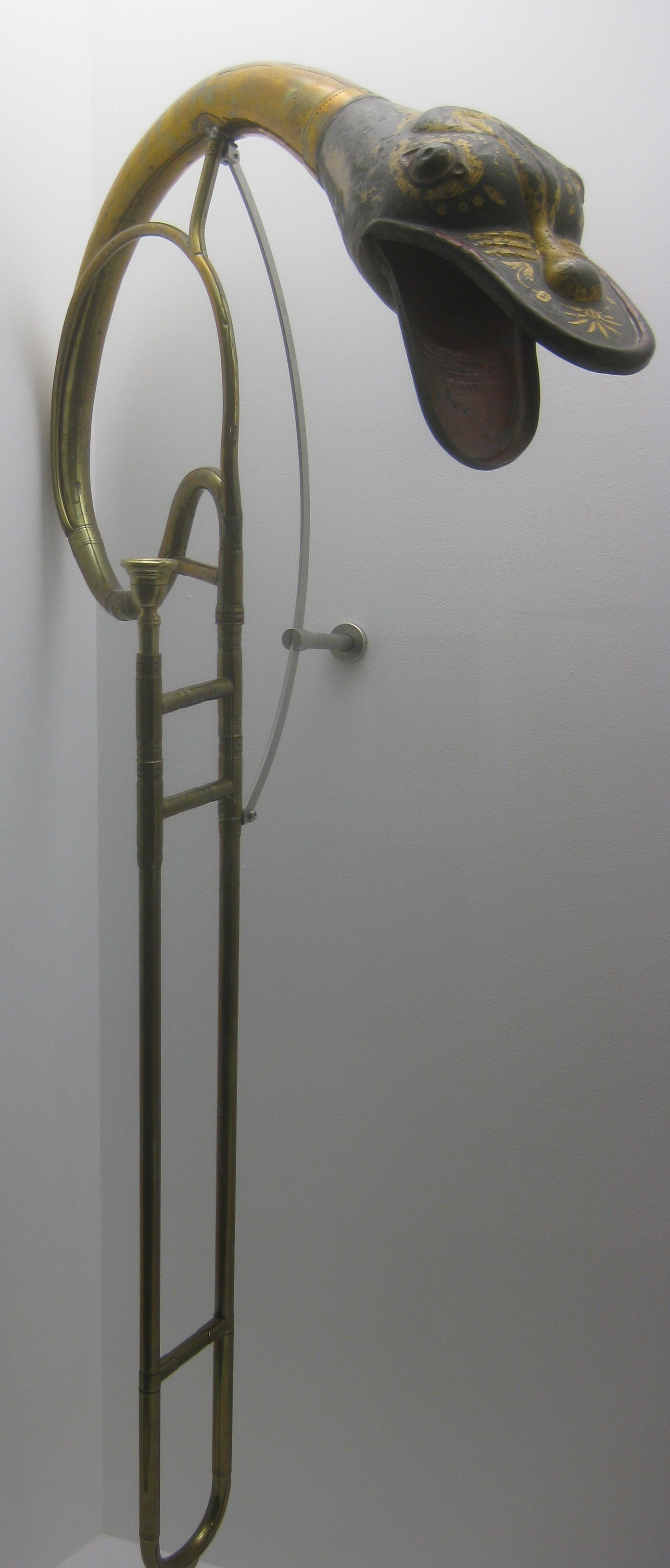 Buccin (Posaune, deren Schallbecher in einer Schlangenprotome endigt, Stuttgart, Fruchtkasten, Musikinstrumentensammlung des Landesmuseums Württemberg.